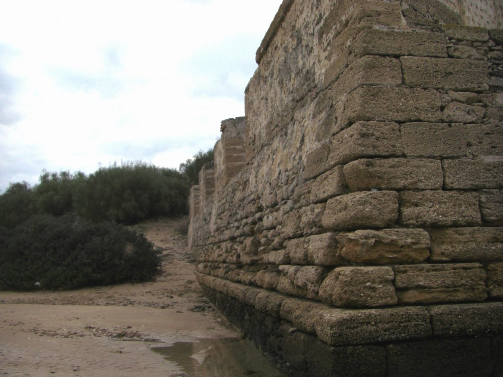 Muralla Sur de la Bateria de Urrutia